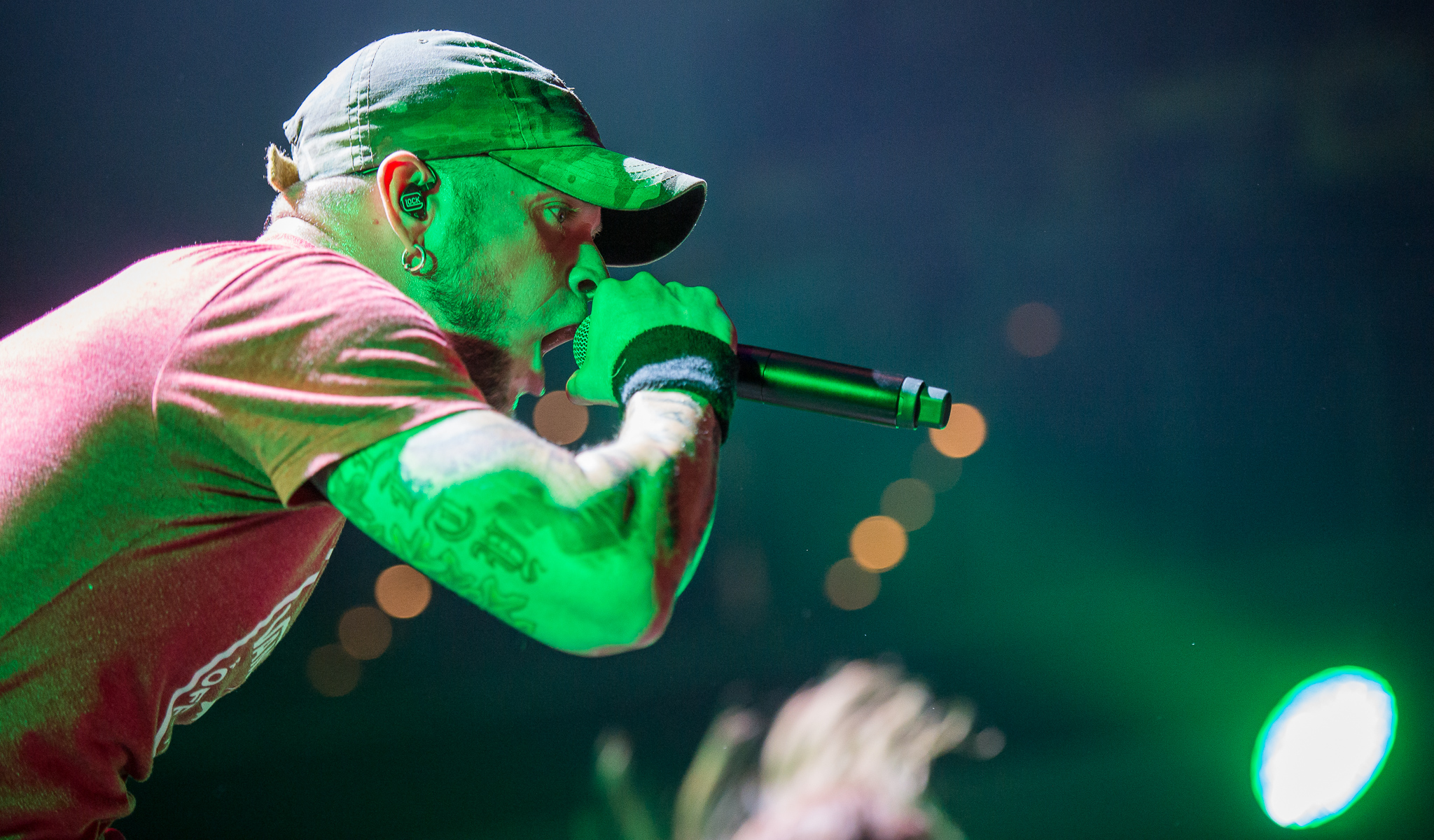 ARGO-Konzerte,All That Remains,Alternarena,Arena Nürnberger Versicherungen,Festival,Konzert,Livekonzert,Livemusik,Musik,Philip Labonte,RiP,Rock im Park 2015